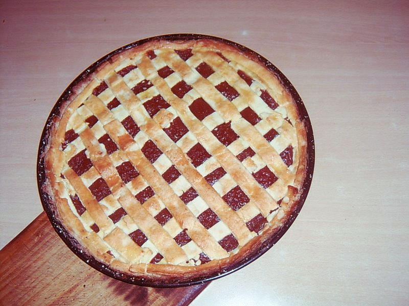 Pasta frola